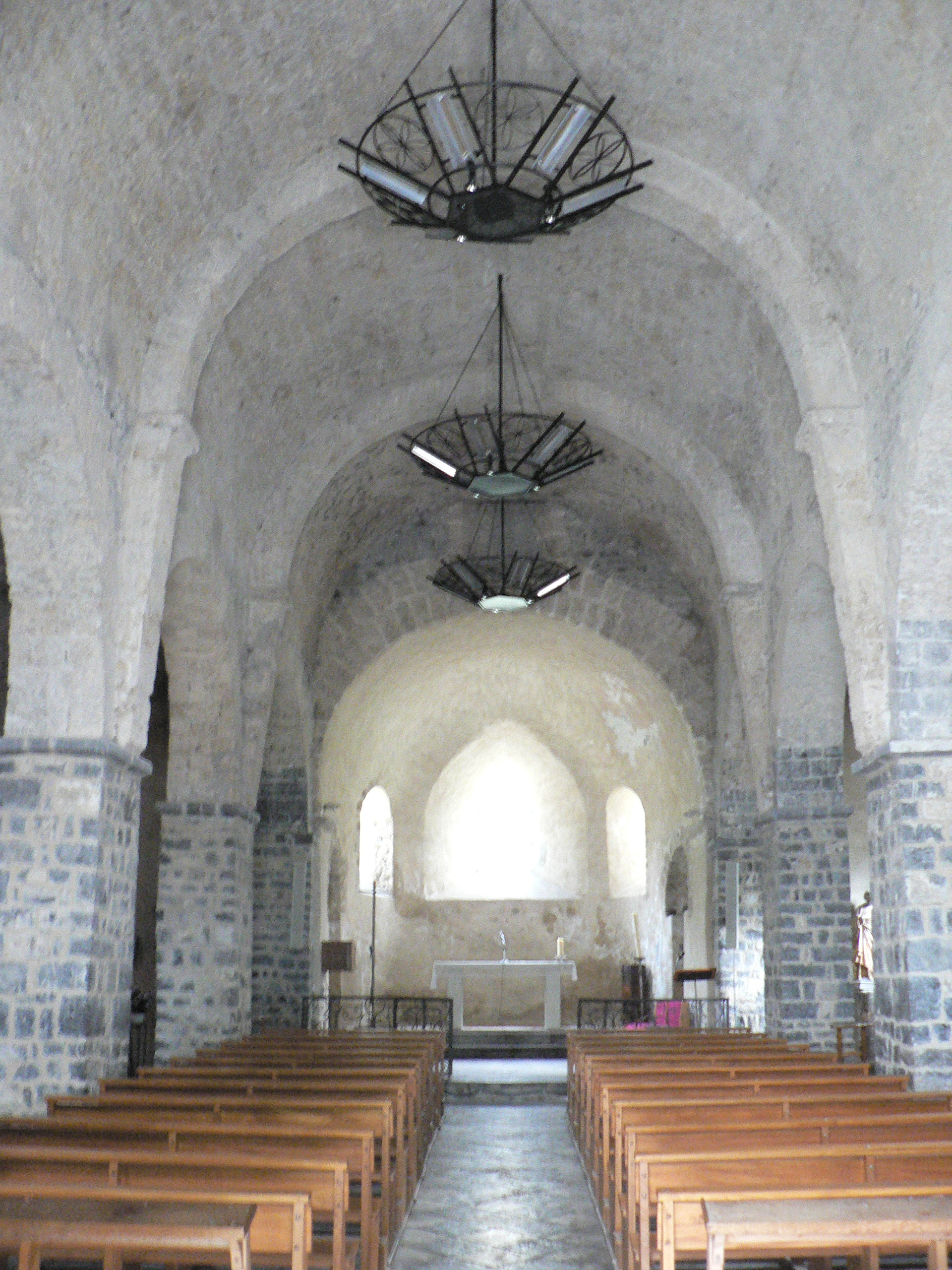 Eglise de Genevrey de Vif - nef .